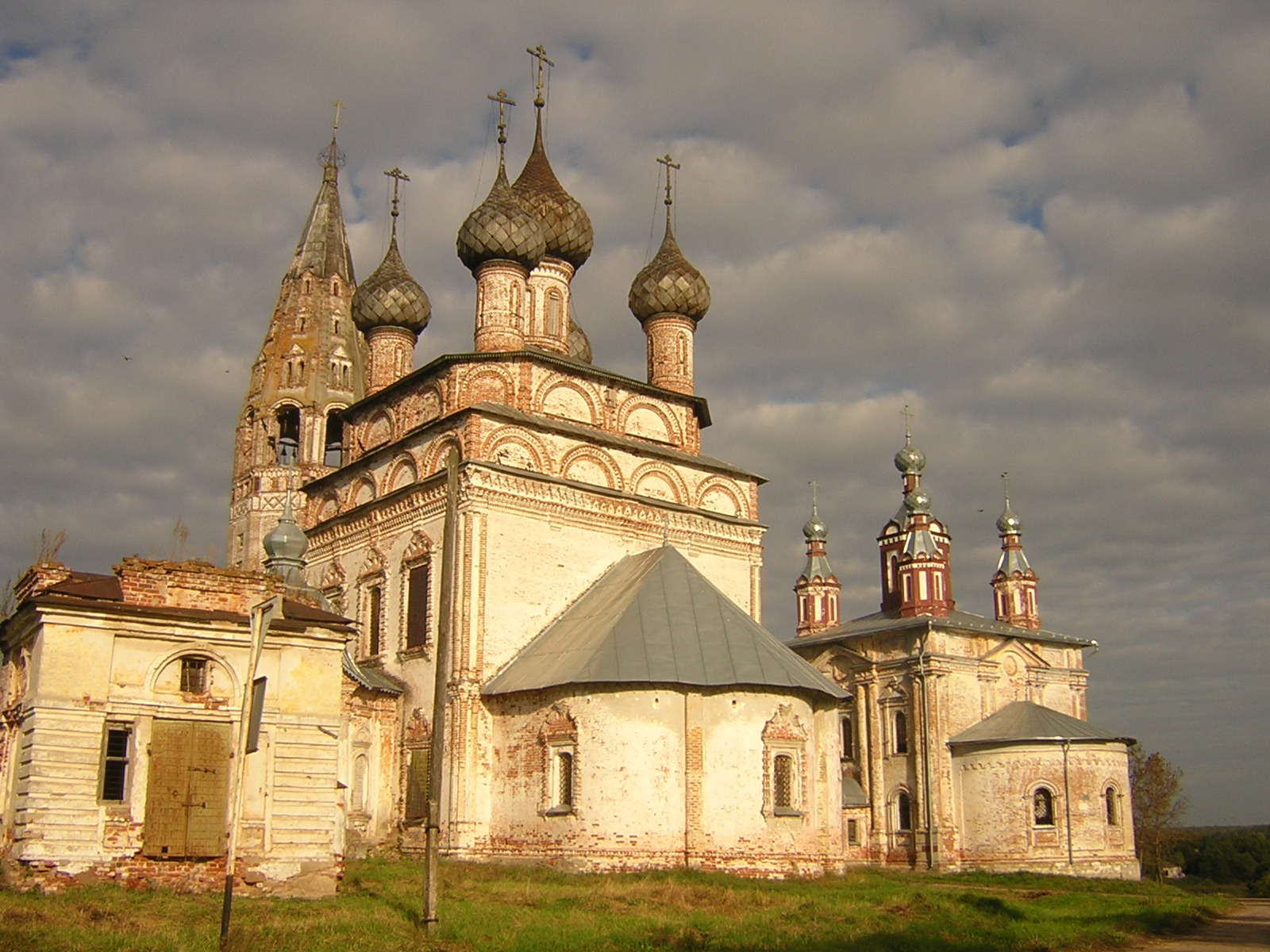 Parskoe Village, Church. Russia, Ivanovo region, near Rodniki. Село Парское, церковь. Россия, Ивановская область, Родниковский район.